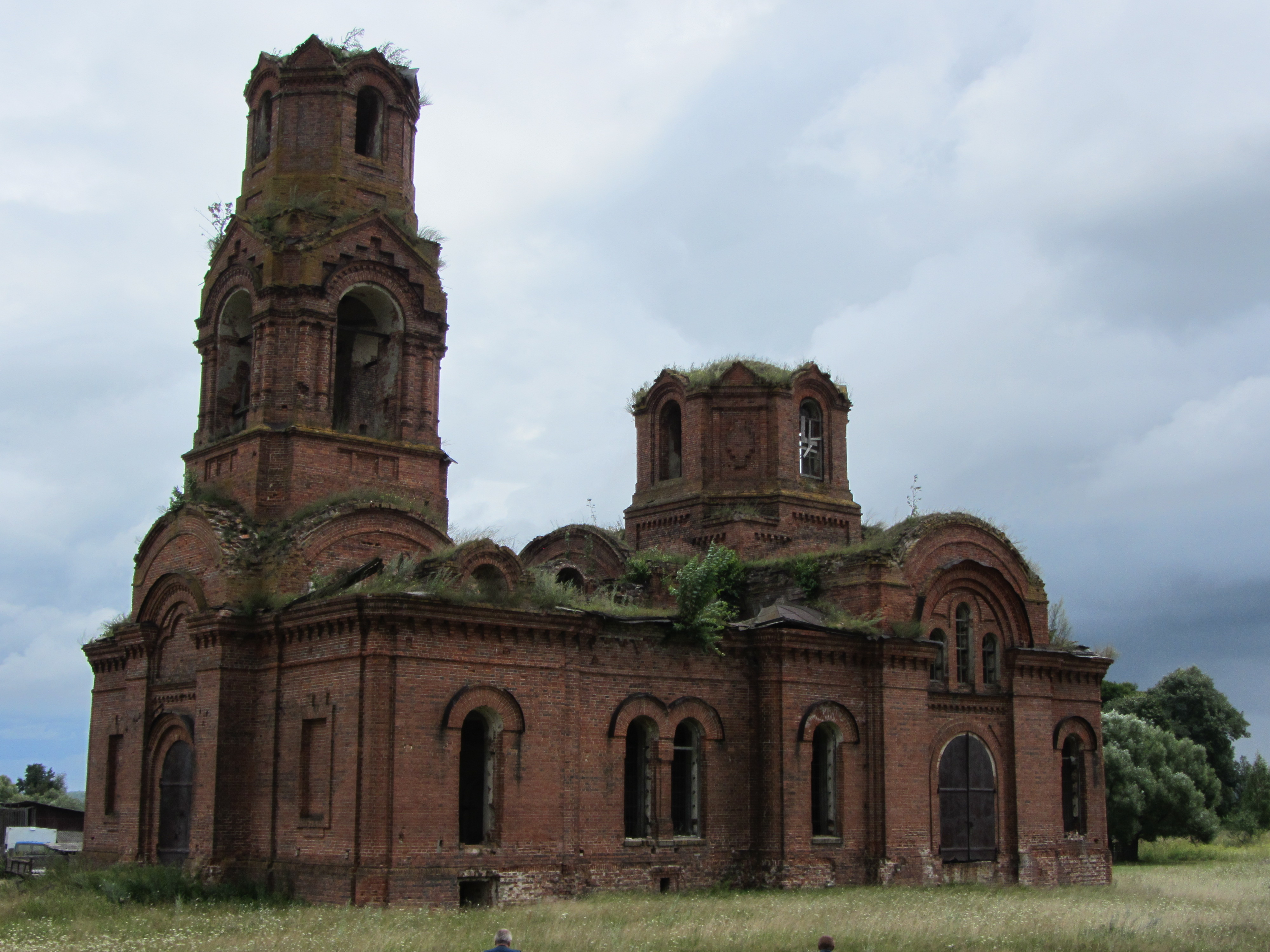 Церковь рождествабогородицы (Смоленская область, Ершачский район, деревня Корсики)